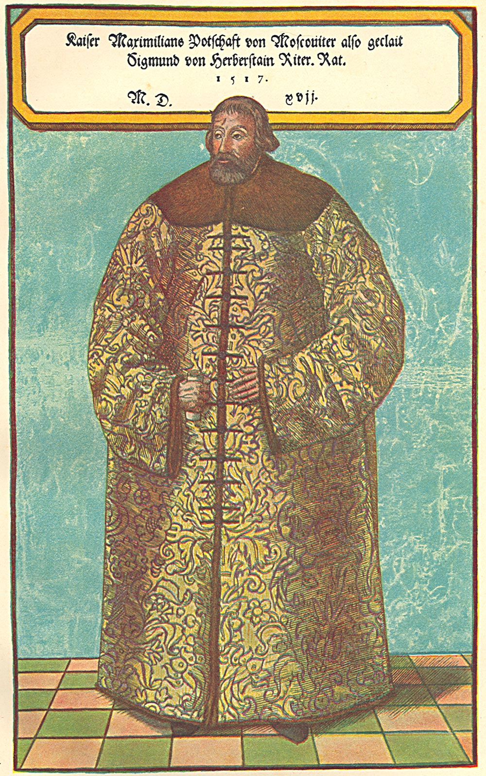 Sigismund von Herberstein Герберштейн в русском одеянии, пожалованном ему Василием Иоанновичем в 1517 г. (с рисунка того времени) // Сигизмунд Герберштейн. Записки о Московитских делах. - СПб., 1908.